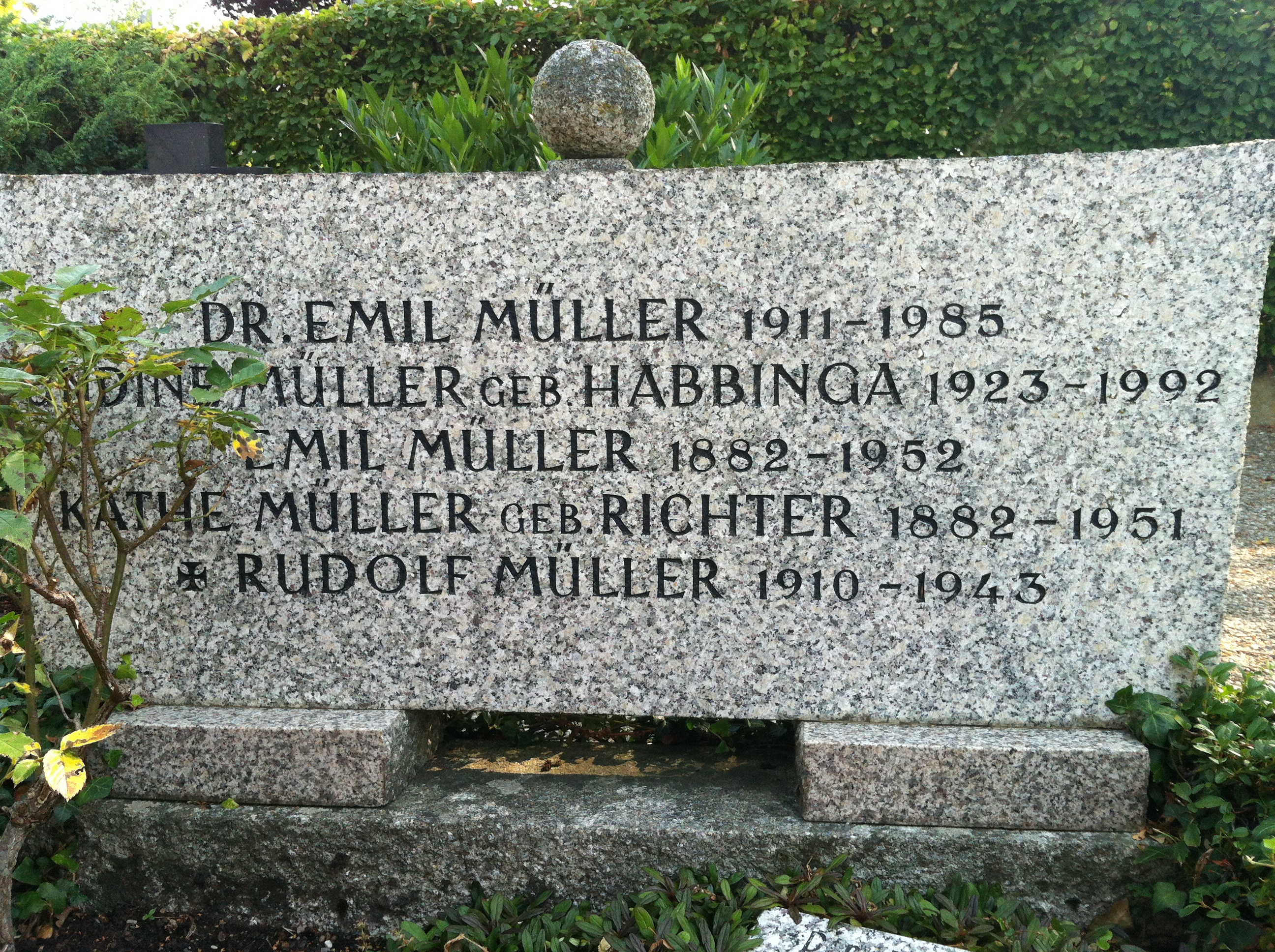 Küssaberg-Kadelburg im Landkreis Waldshut in Baden-Württemberg: Grabstein des Althistorikers und Heimatforschers Dr. Emil Müller-Ettikon.